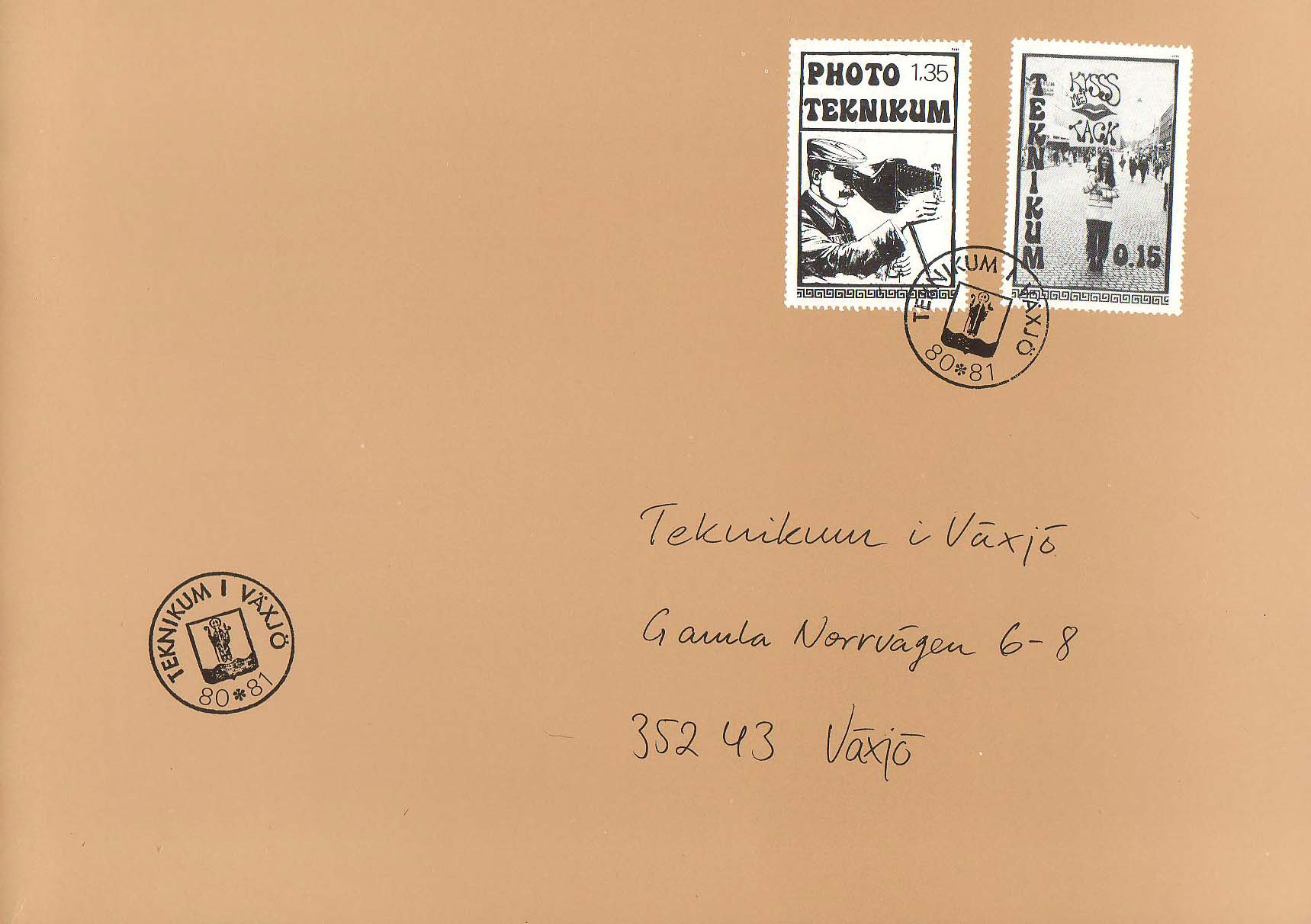 Fotokatalog från gymnasieskolan Teknikum i Växjö. Katalogen producerades av skolans fotoförening, Photo Teknikum. På bilden visas katalogen för läsåret 1980/81